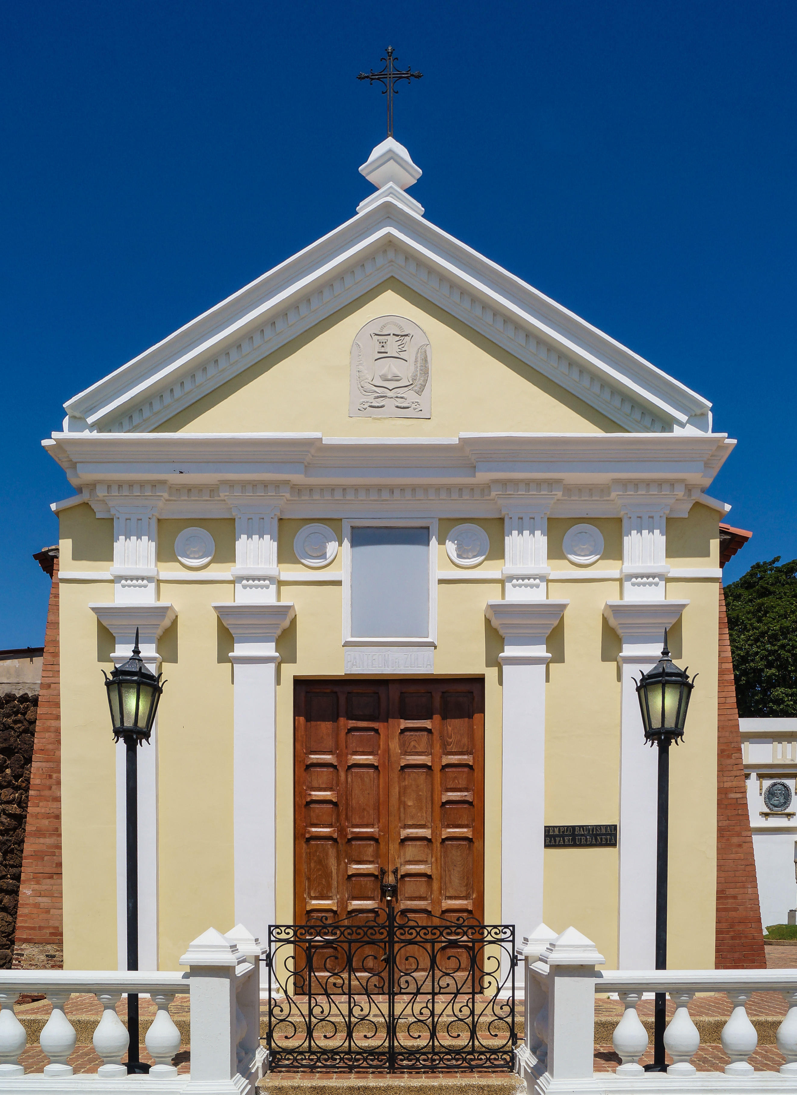 Su funcionamiento se remonta a 1988. Antiguamenyte era la capilla de Nuestra Señora de Coromoto, y en él tienen sus última morada los hombres y mujeres ilustres que con su trabajo han forjado el estado, como próceres de la Independencia, músicos, poetas, escritores, entre otros. Maracaibo